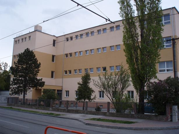 Gymnázium školských bratov